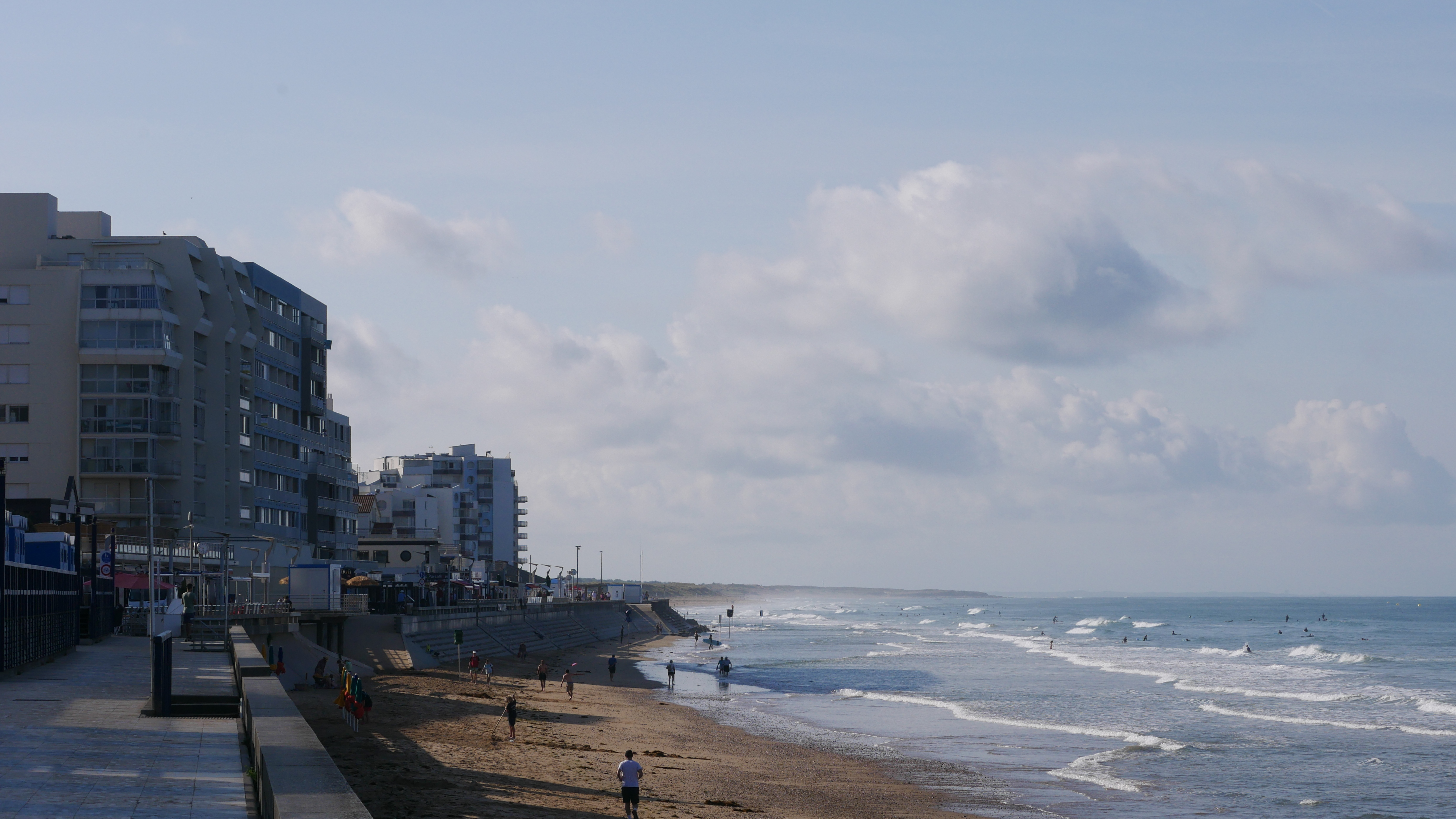 Le remblai et la grande plage de Saint-Gilles-Croix-de-Vie.